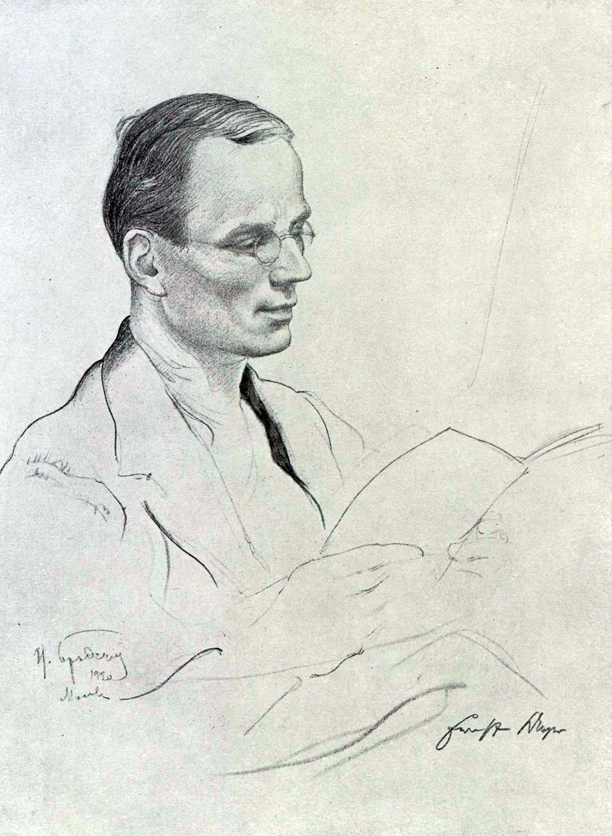 Мейер, Эрнст